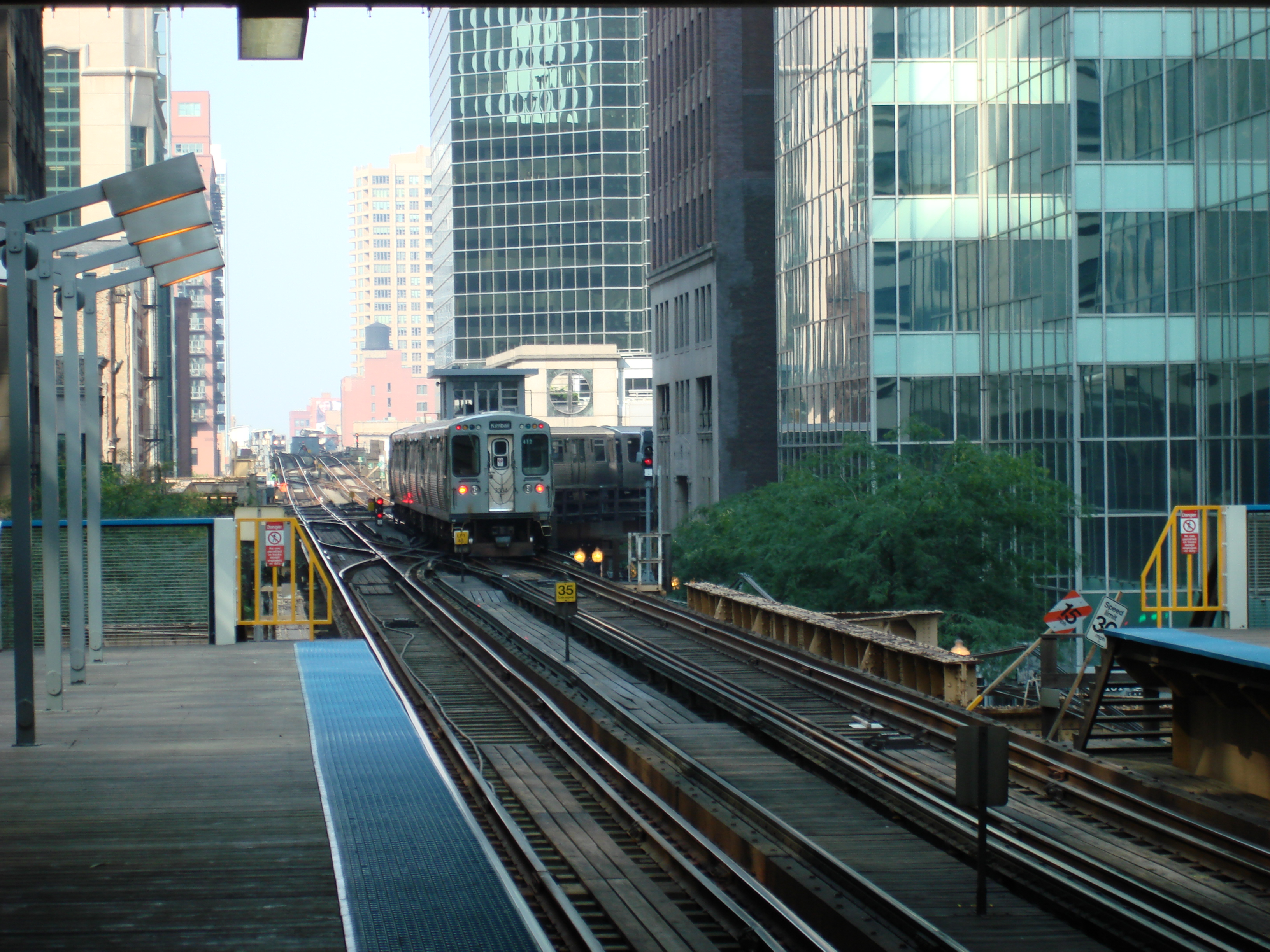 photo de la tour 18 sur loop